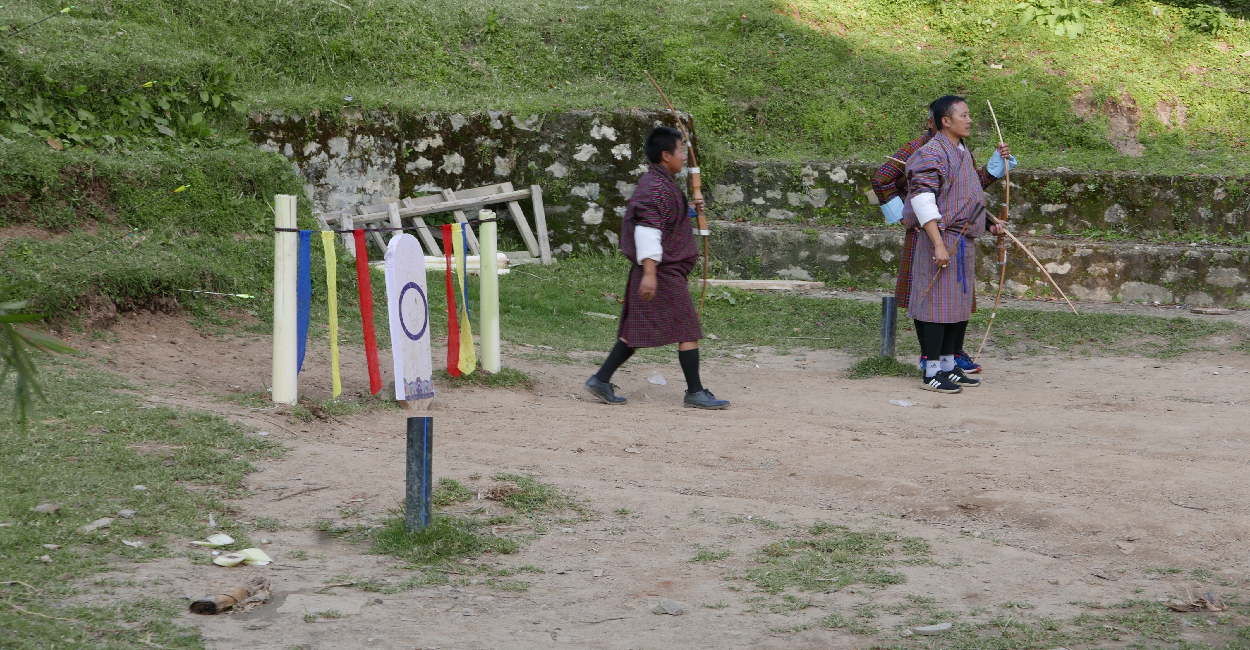 Drei Bogenschützen beim Bogenschießen in Trongsa. Zwei halten Kompositbögen und einer einen Bambusbogen. Zwei ähnliche Zielscheiben sind jeweils am Ende der 145 Meter auseinander liegenden Bahn installiert.